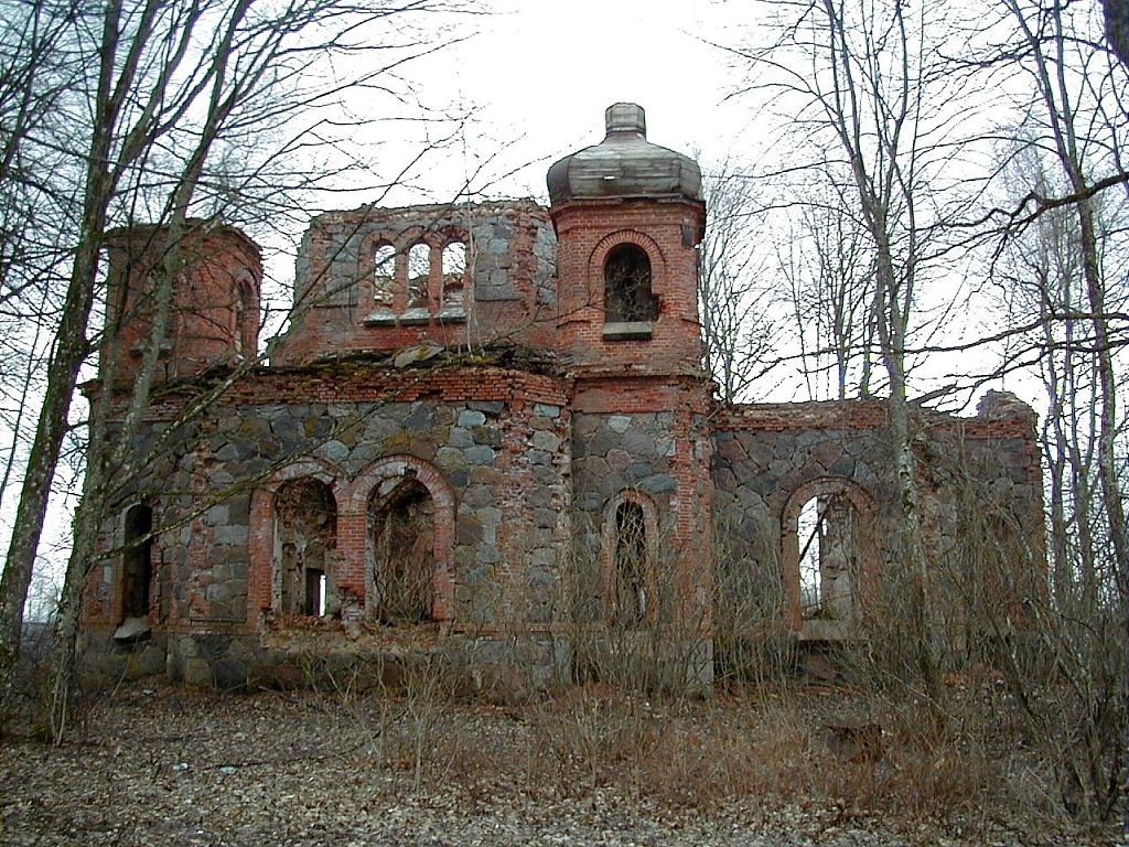 Bērzaunes pareizticīgo baznīcas drupas 2003-04-18